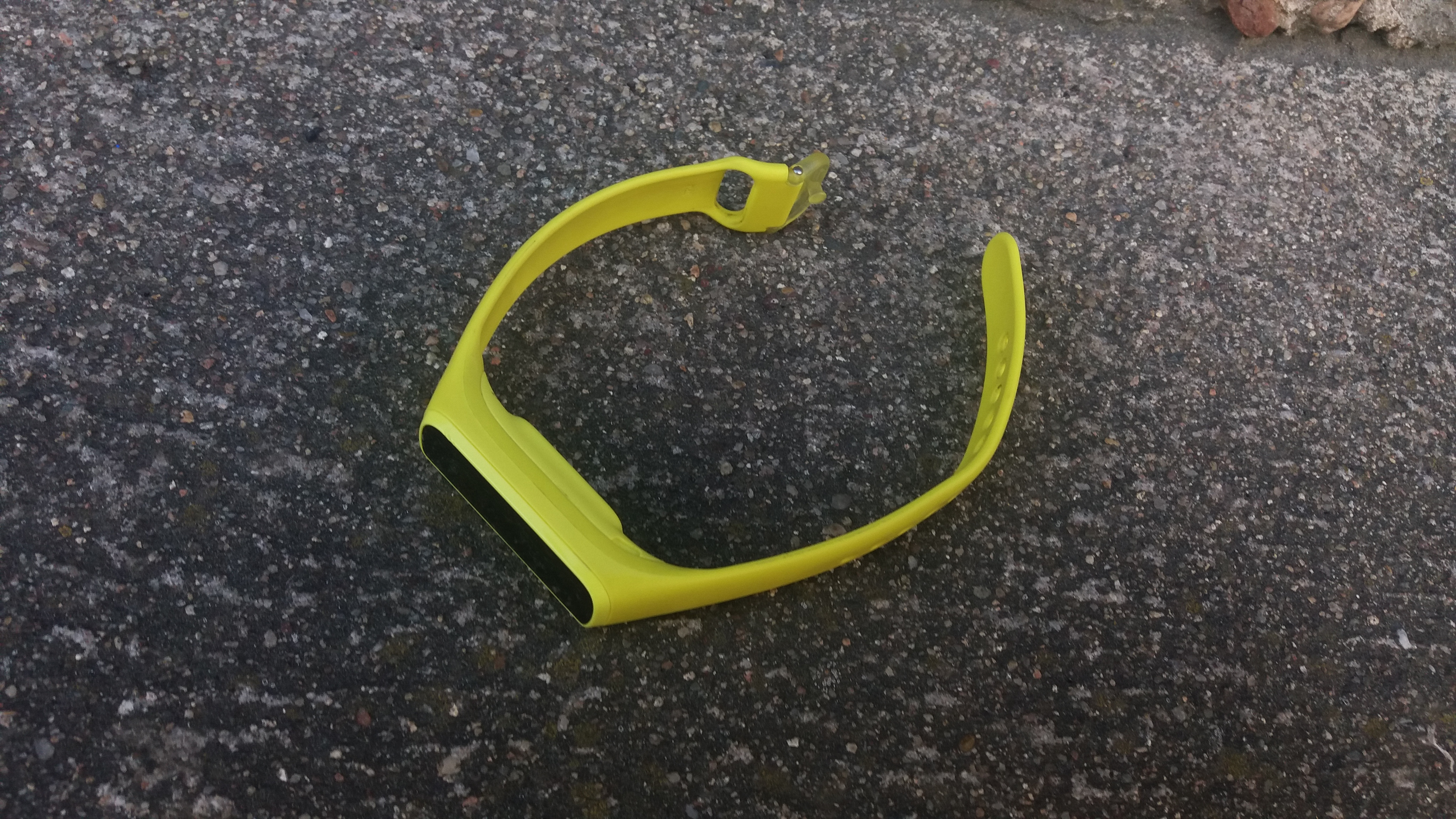 Smartband, model Samsung Galaxy Fit E